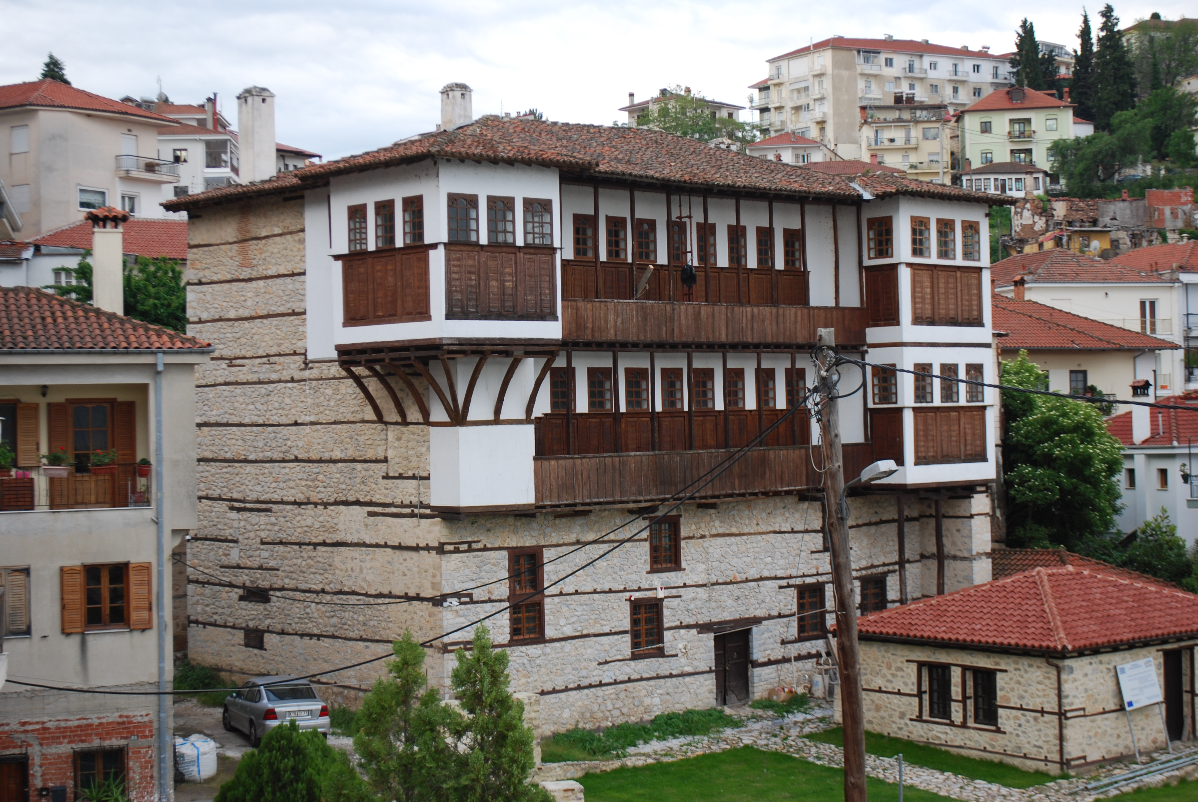 Vue de Kastoria.